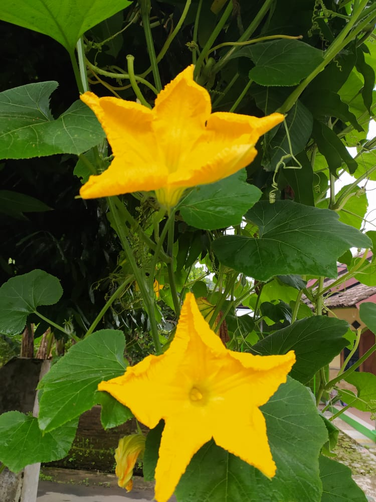 Dua bunga labu kuning yang sedang mekar berkembang di Jawa Tengah, Indonesia